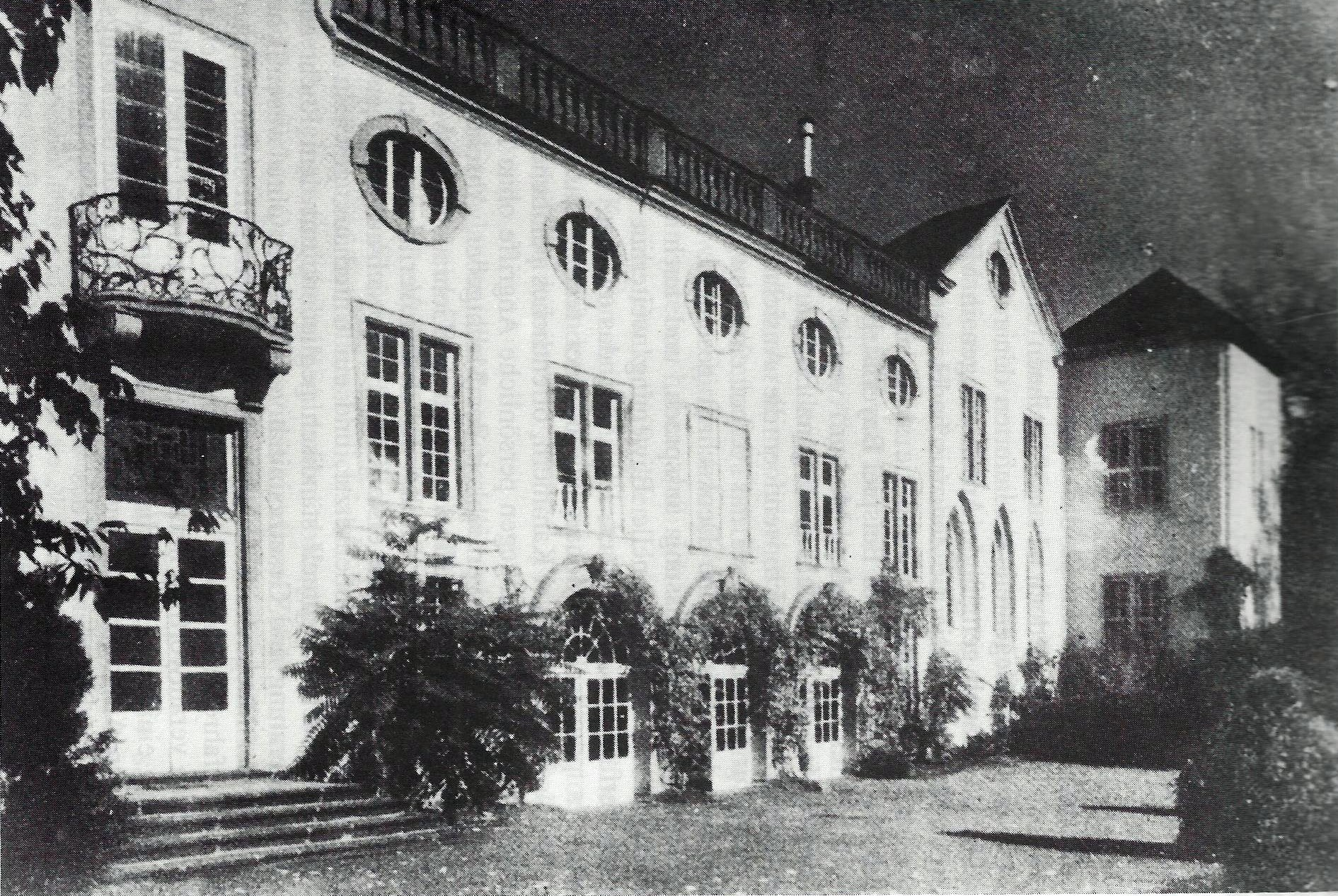 Gartenfront des von der Leyenschen Hofes in Koblenz; Sitz vom Generalkommando des VIII. Armee-Korps